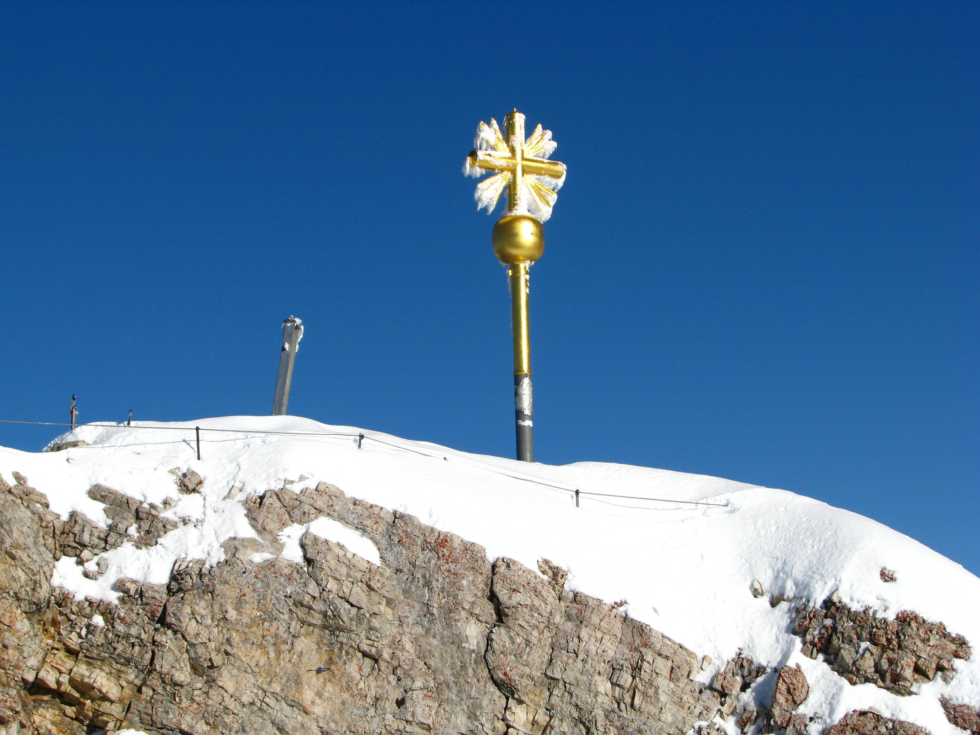 Nahaufnahme des Gipfelkreuzes der Zugspitze (2964 m).